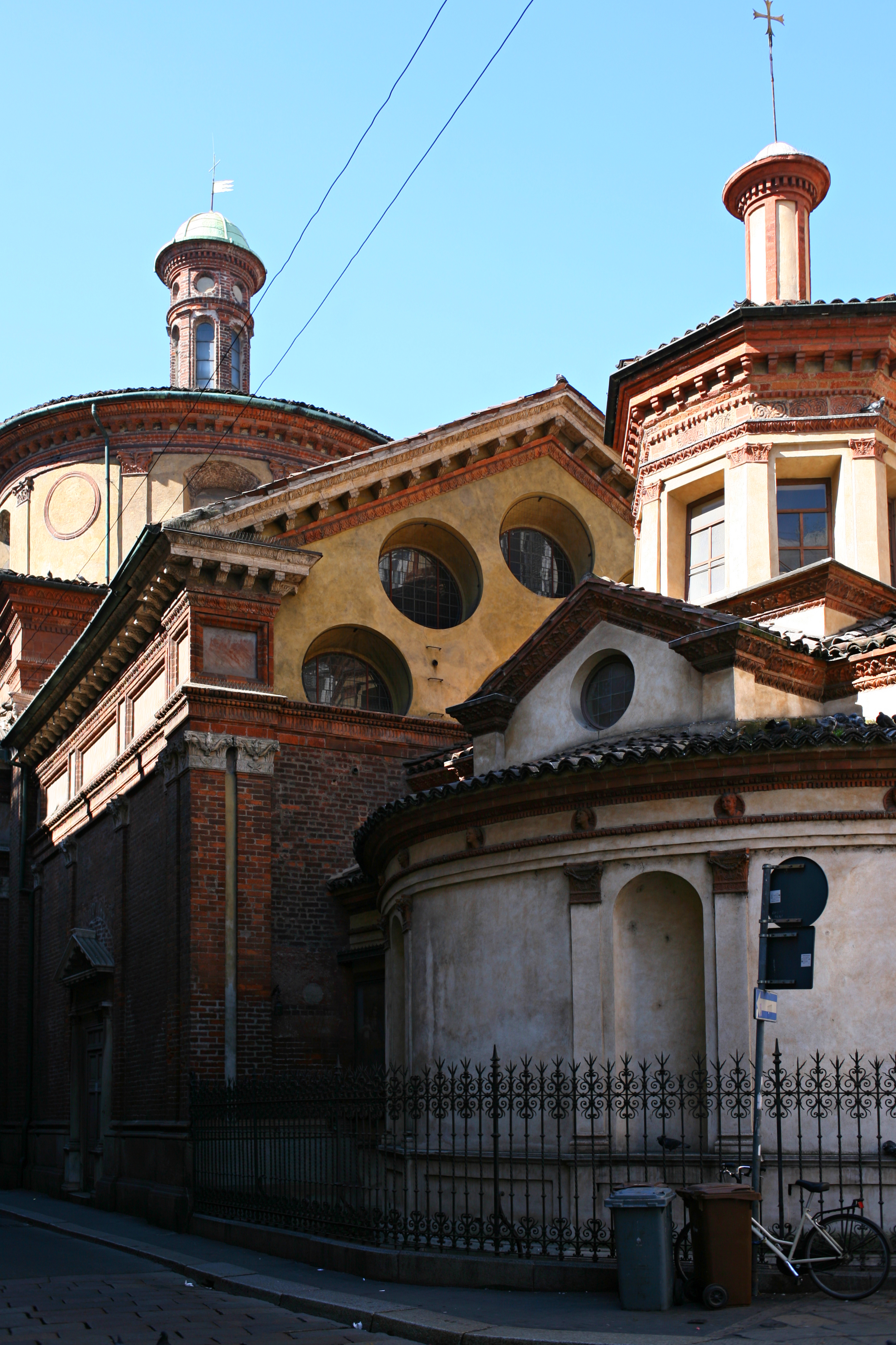 La chiesa di San Satiro a Milano nelle sue viste esterne e interne